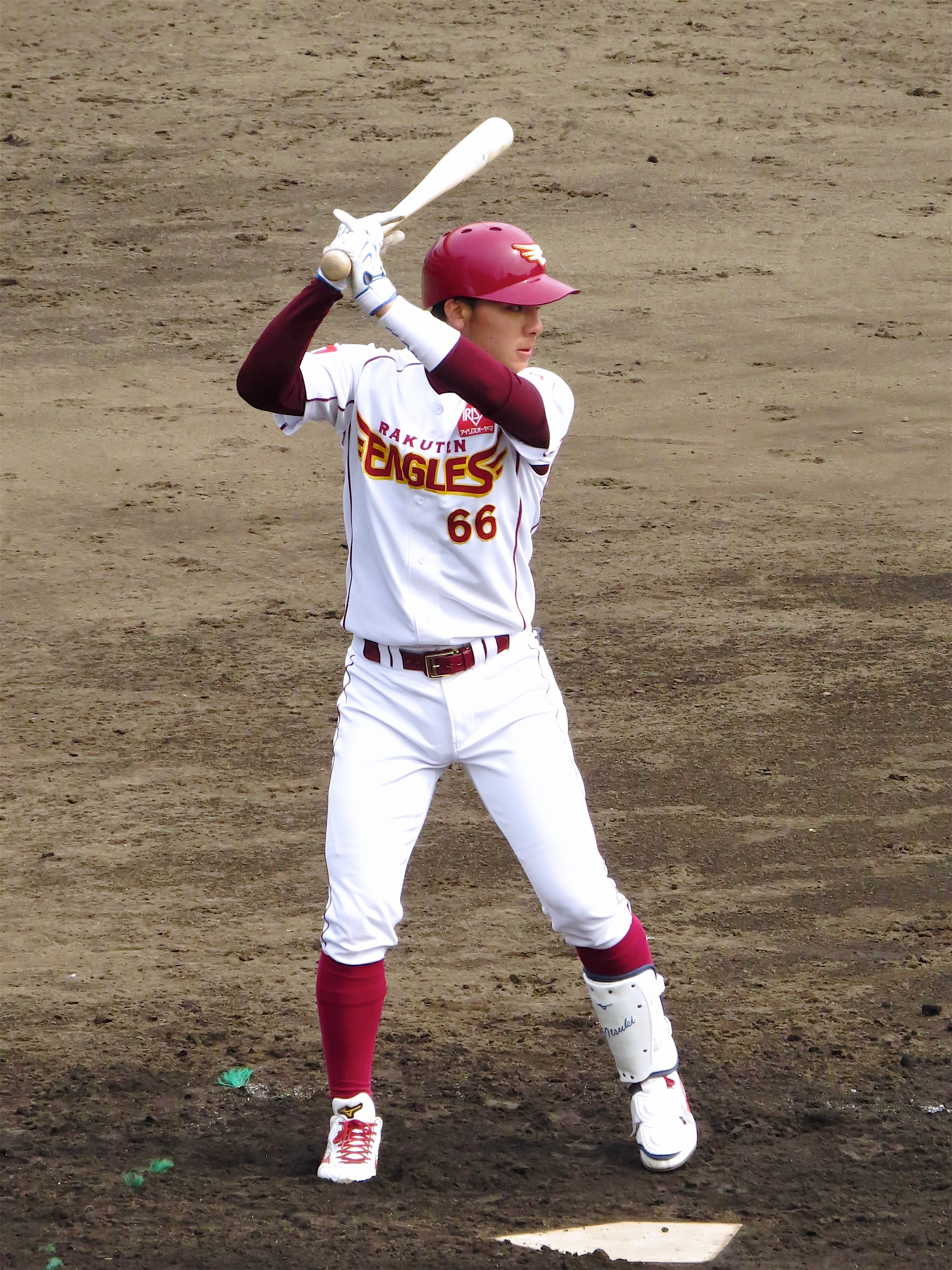 さいたま市営浦和球場にて